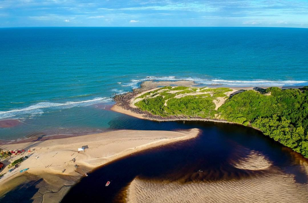 praia de Boca da barra mataraca paraiba